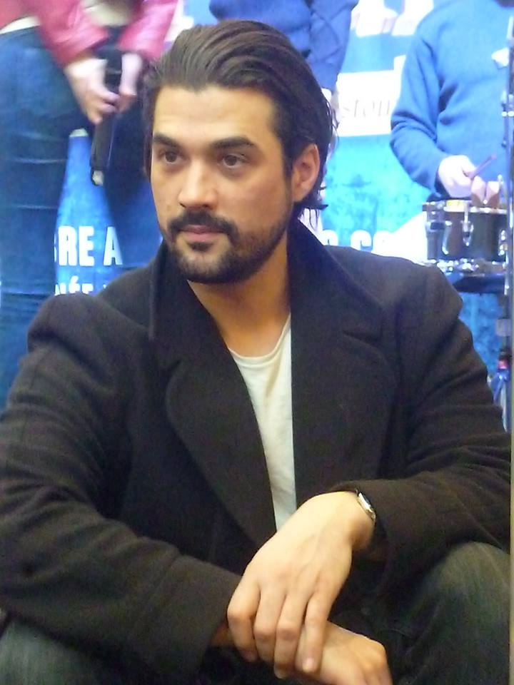 Florent Mothe le 21 février 2015 à Vélizy lors du showcase de La légende du roi Arthur